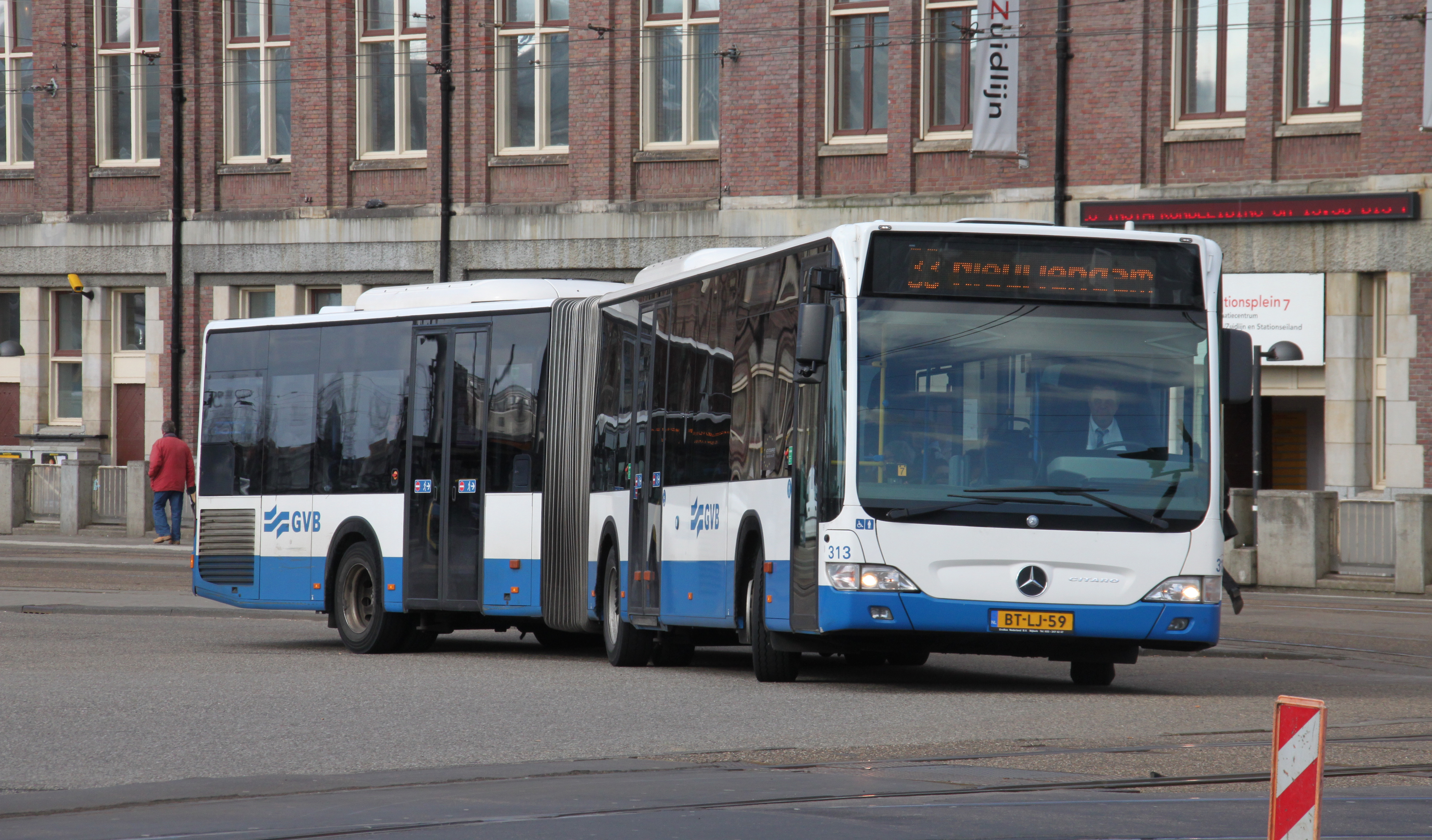 Gelede GVB bus te Amsterdam Centraal Station.